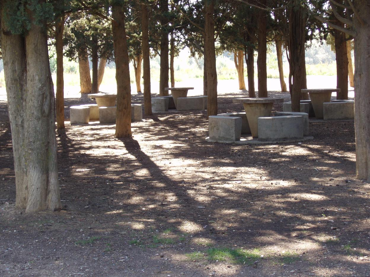 Provincia de Huesca, España.